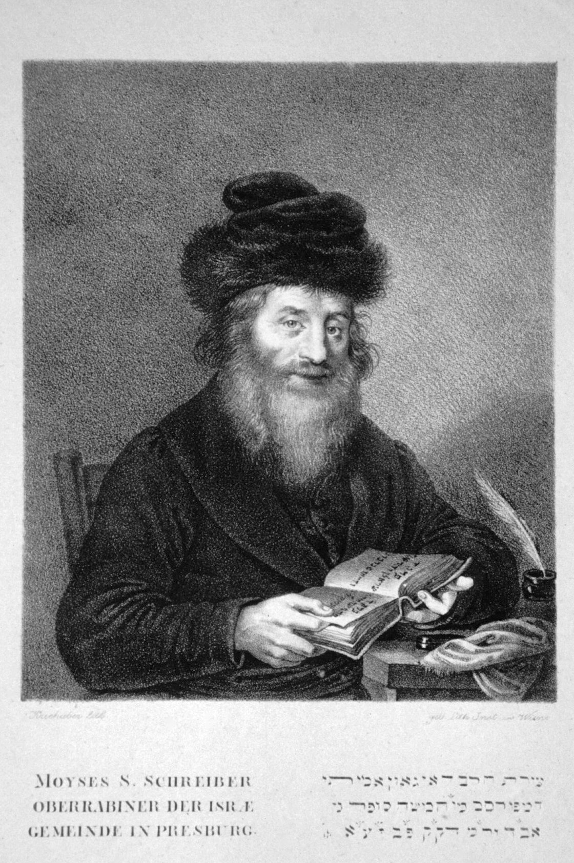 Moses S. Schreiber (1762-1839), Oberrabiner der israelitischen Gmeinde Pressburg. Berühmter Talmudgelehrter Lithographie von Josef Kriehuber, um 1830